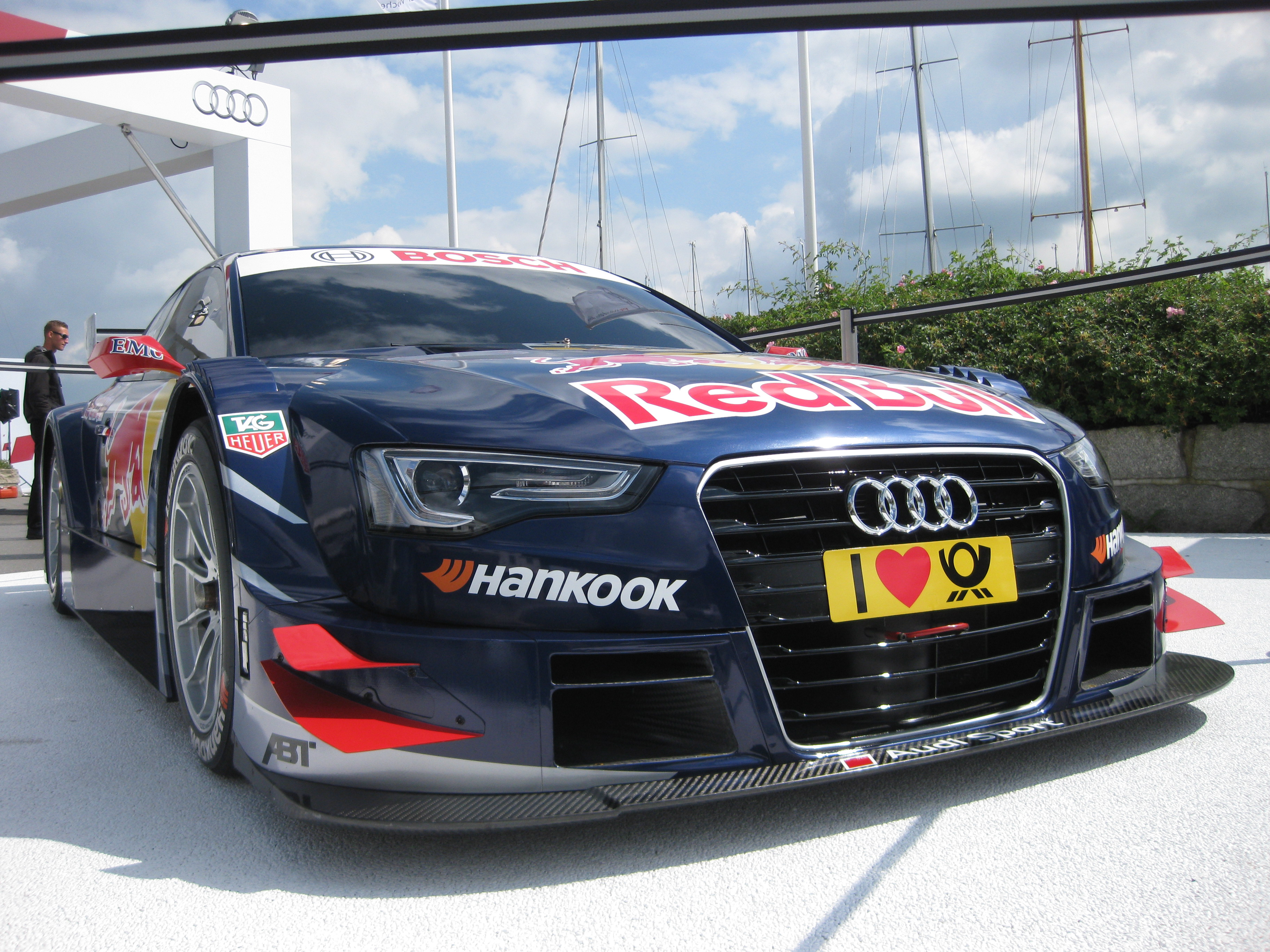 Audi A5 DTM (R17) von Abt Sportsline